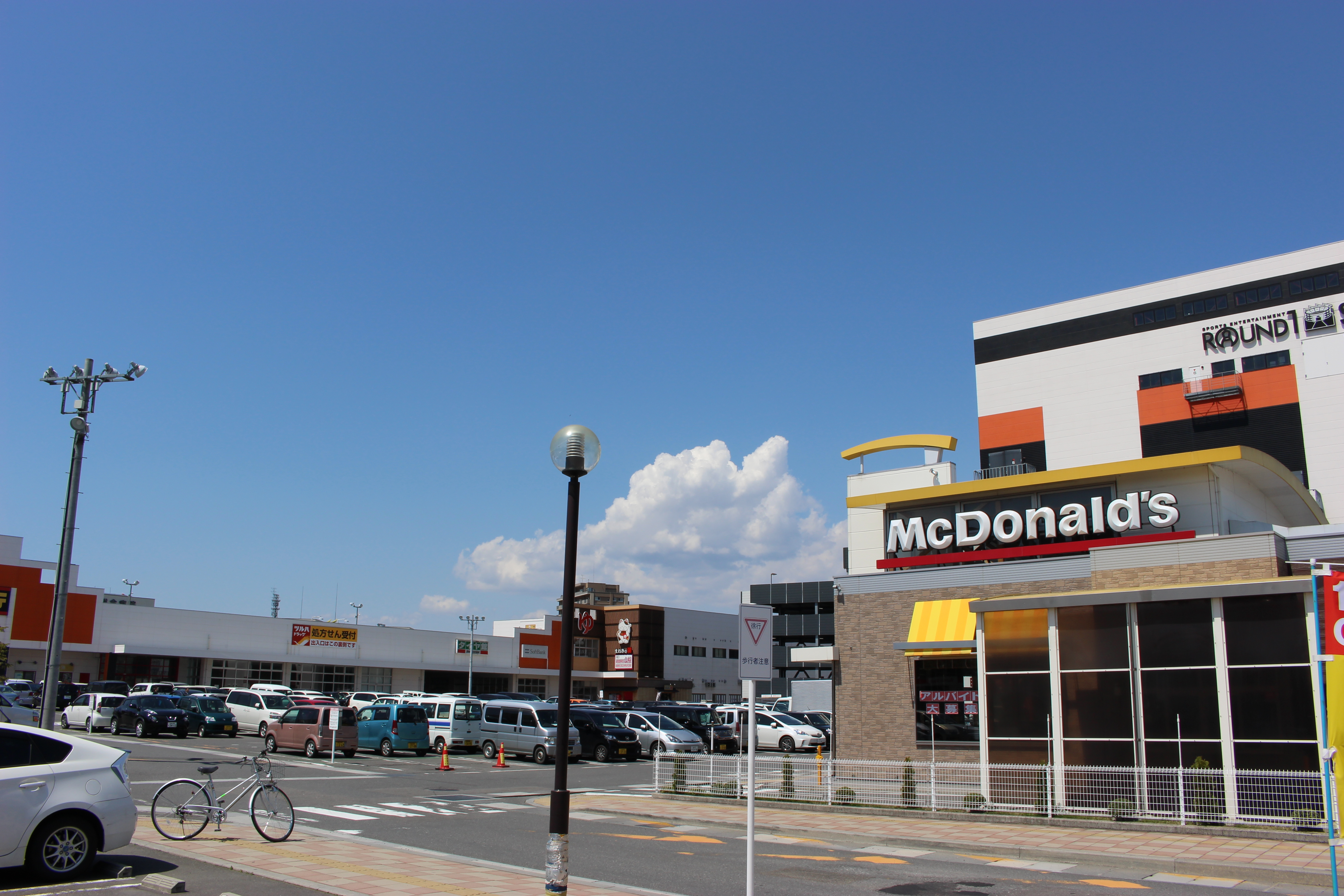 郡山駅東ショッピングセンター（2015年4月撮影）